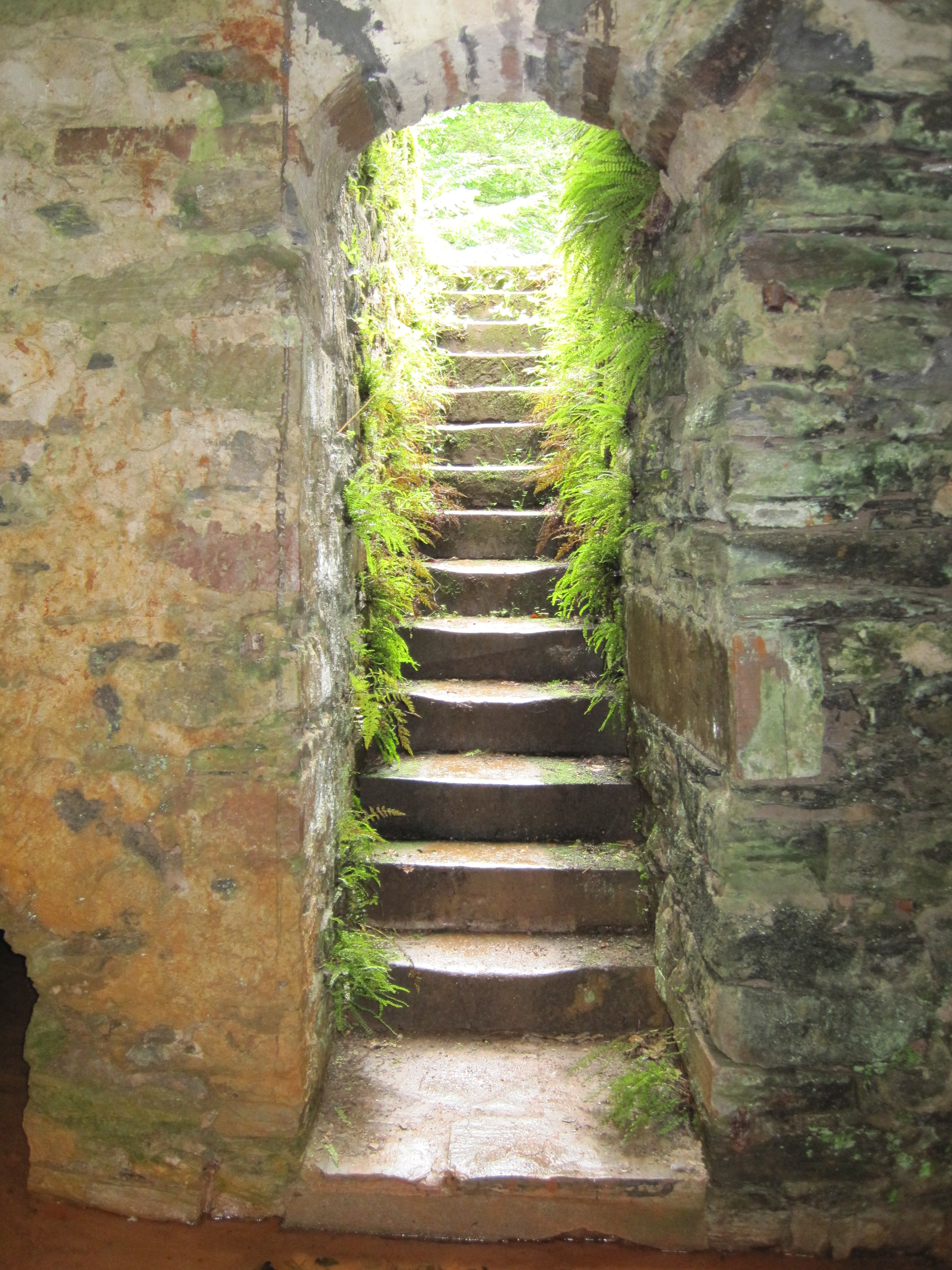 Aufstieg aus dem Brunnenhaus des Werkerbrunnens am Wispertalsteig im Naturpark Rhein-Taunus